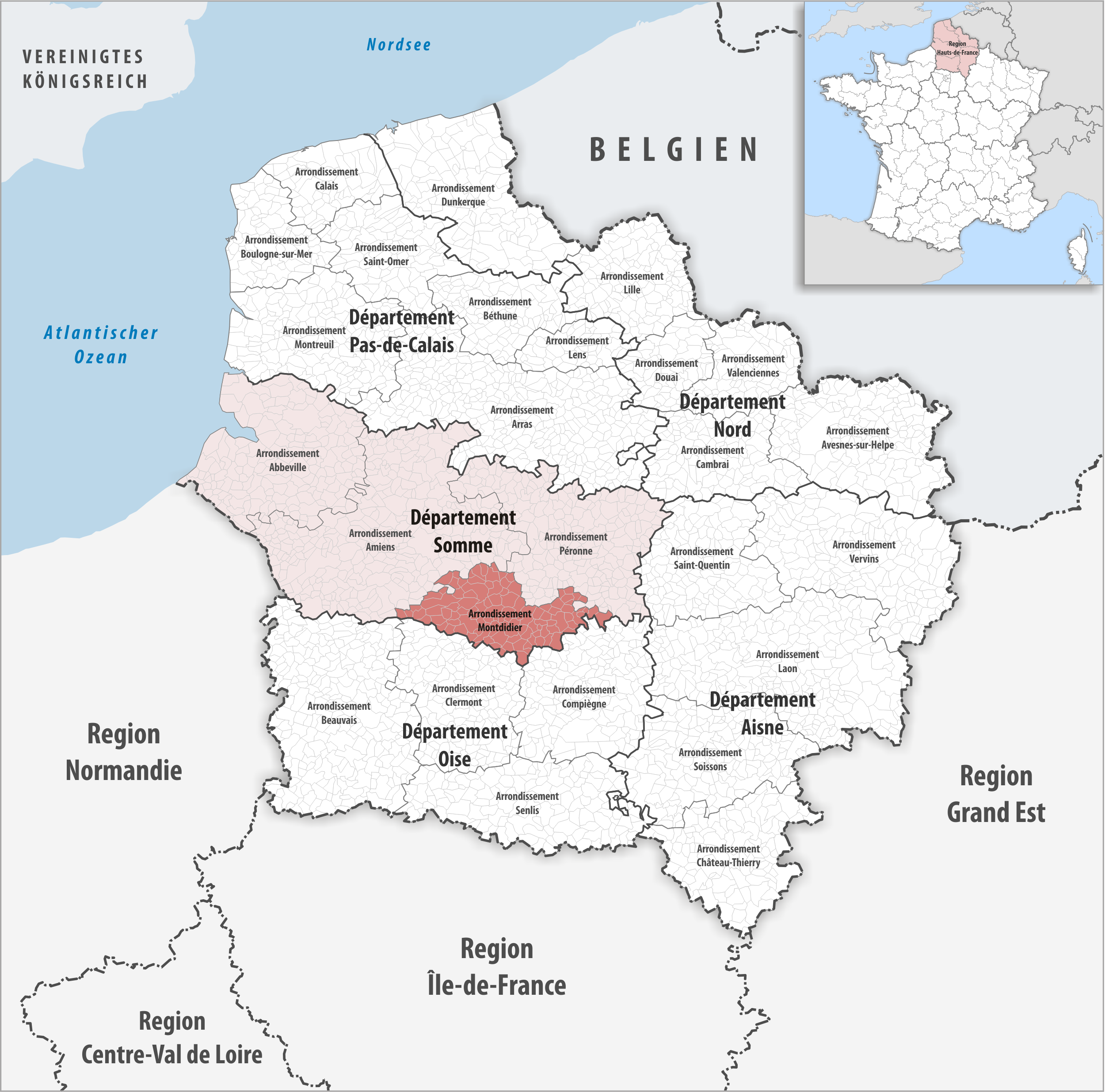 Lage des Arrondissements Montdidier